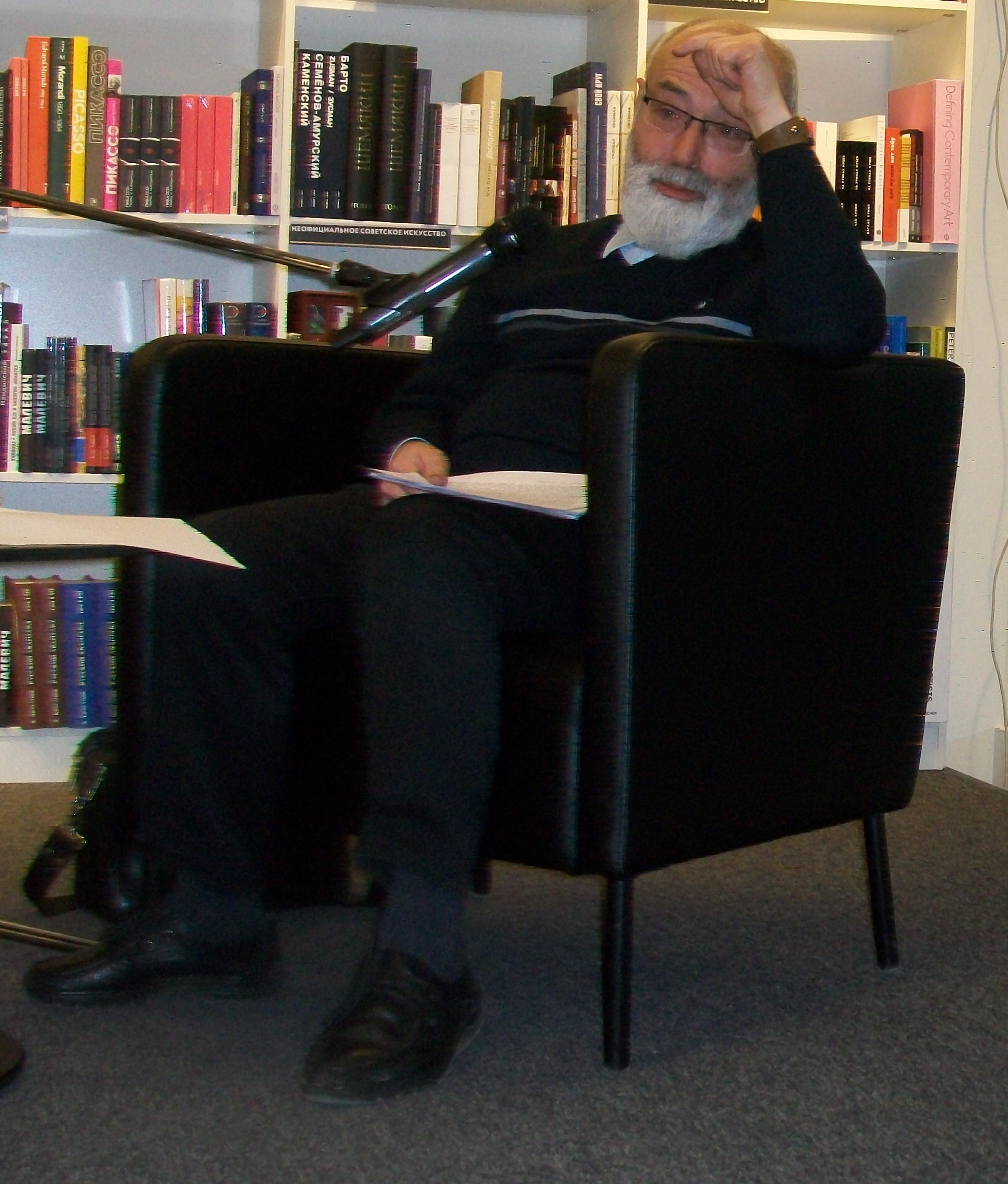 Абрам Ильич Рейтблат читает лекцию в Ельцин-центре, 22 апреля 2017 года